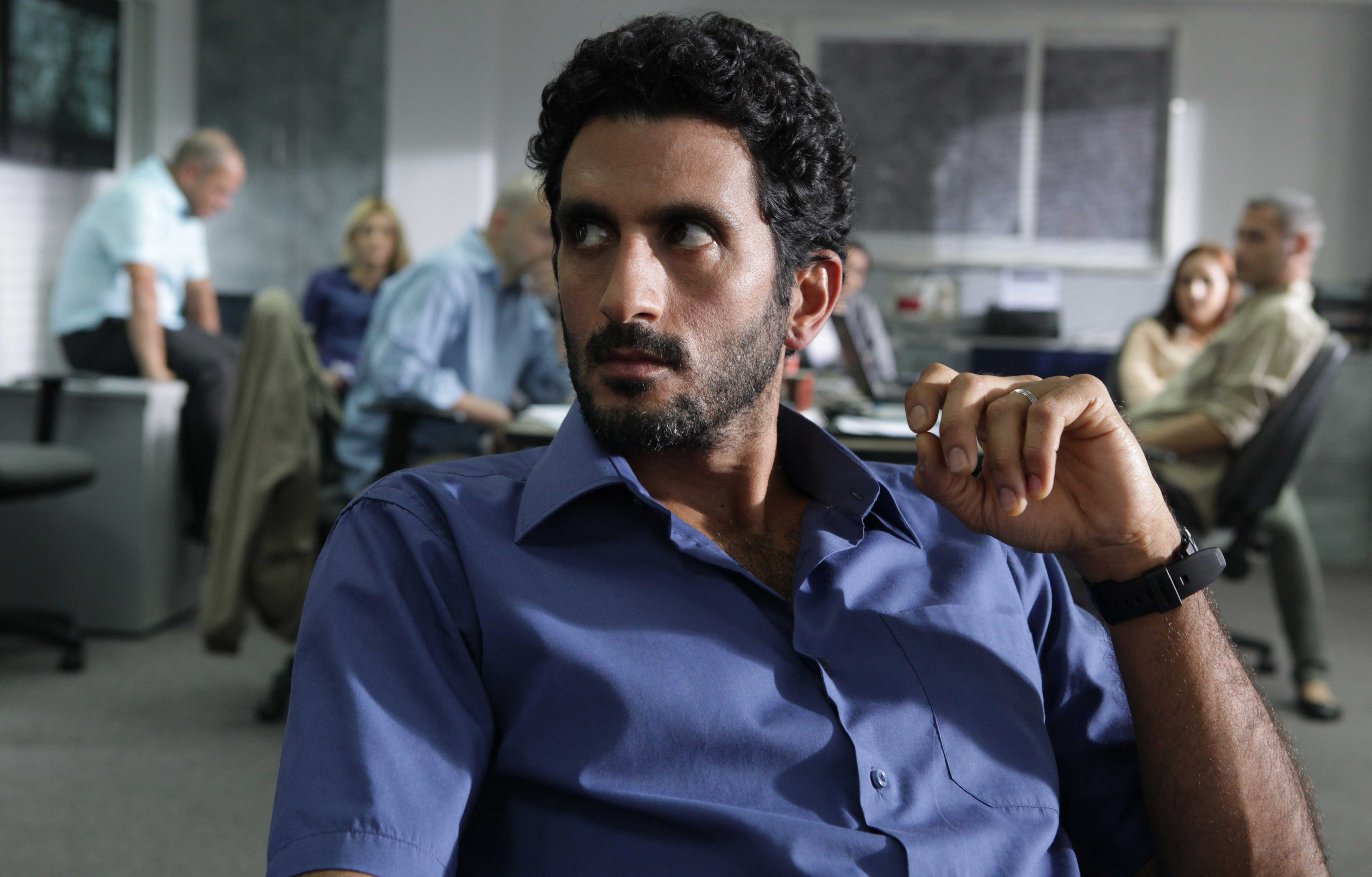 צחי הלוי בסרט "בית לחם"